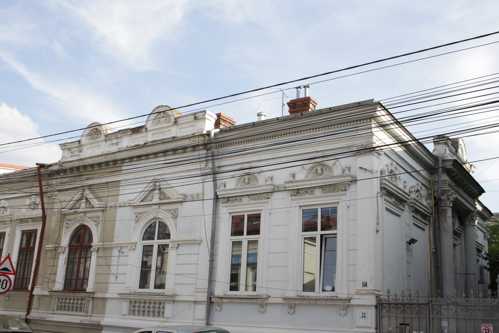 Casă, Str. Alexandrescu Grigore 32-34 sector 1